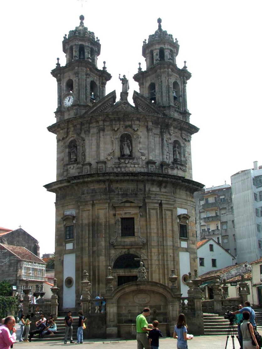 Igrexa da peregrina, Pontevedra, Galicia